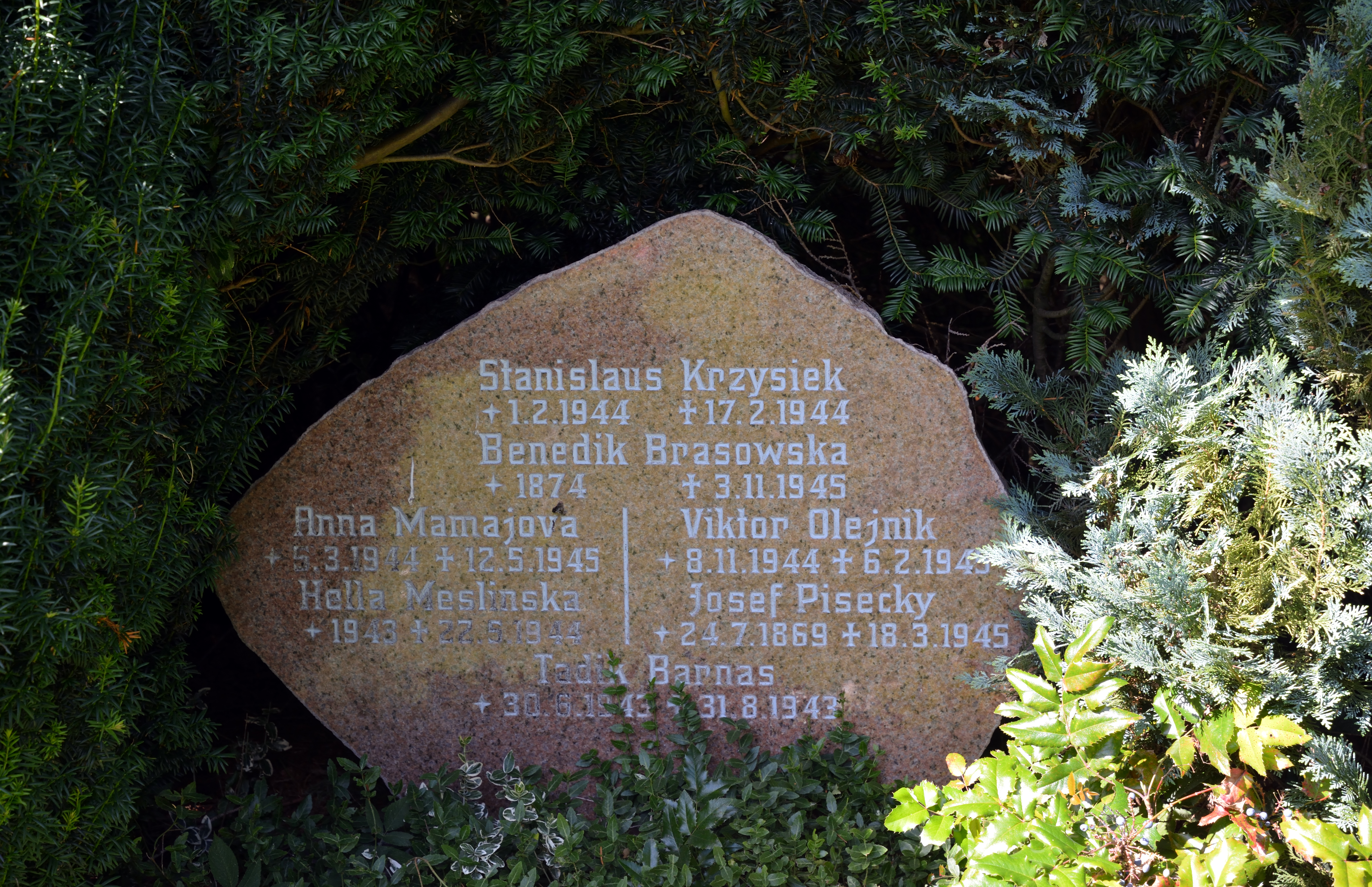 Gräber auf dem Friedhof von Jevenstedt